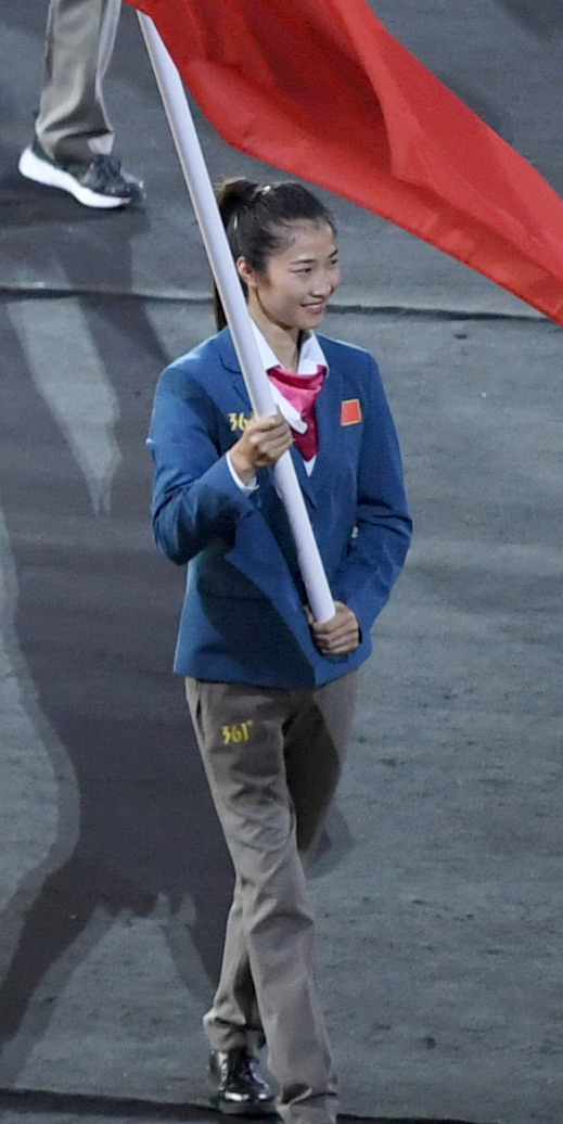 Rio de Janeiro - Cerimônia de abertura dos Jogos Paralímpicos Rio 2016 no Estádio do Maracanã